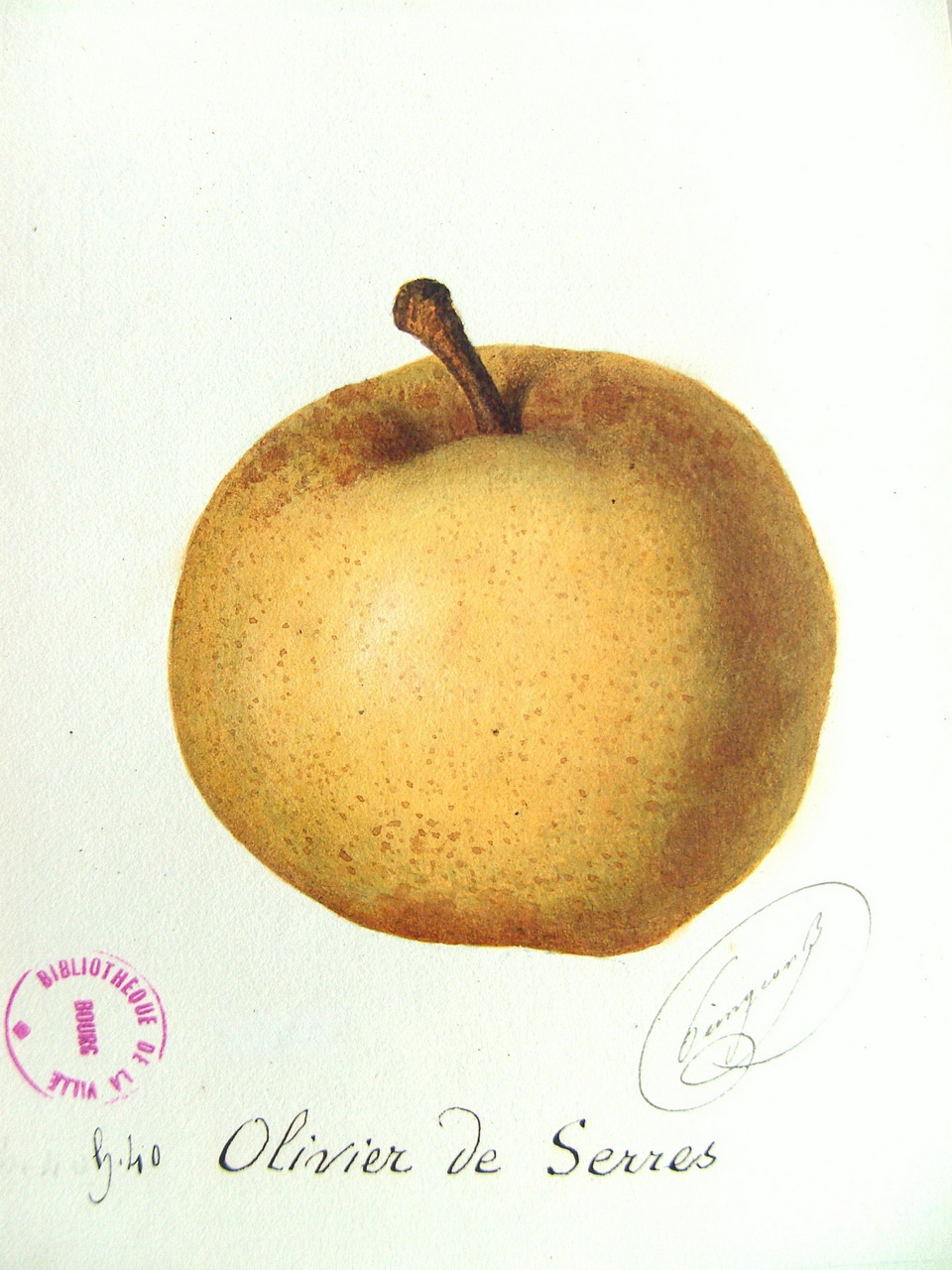 Poire "Olivier de Serres", Le verger français, 1889.